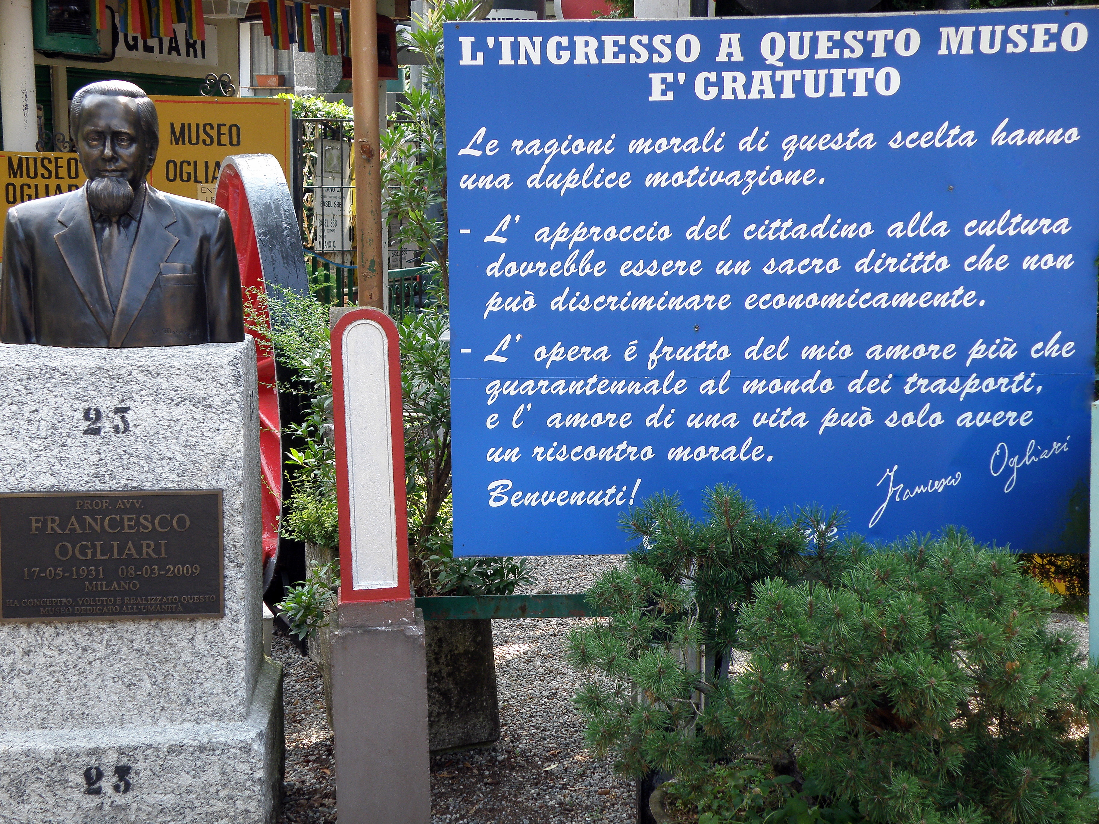 Ranco, prov. de Varèse (région Lombardie, Italie). Buste de Francesco Ogliari à l'entrée du musée européen des Transports (Museo europeo dei trasporti), dont il fut le fondateur et qui porte son nom. L'écriteau à droite porte l'inscription suivante : L'ENTRÉE DANS LE PRÉSENT MUSÉE EST GRATUITE Les raisons morales de ce choix s'appuient sur un motif double. - L'accès du citoyen à la culture devrait constituer un droit sacré, qui ne peut être sujet à discrimination économique. - Cette œuvre est le fruit de l'amour que je voue au monde des transports depuis plus d'une quarantaine d'années, et l'amour d'une vie ne saurait avoir de rétribution autre que morale. Bienvenue !